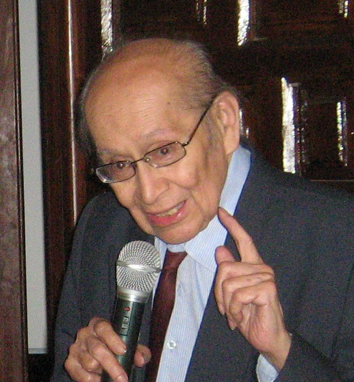 Intervención de Miguel Maticorena en homenaje a Ella D. Temple y Carlos Radicati en la Casa Graña (Jesús María, Lima)